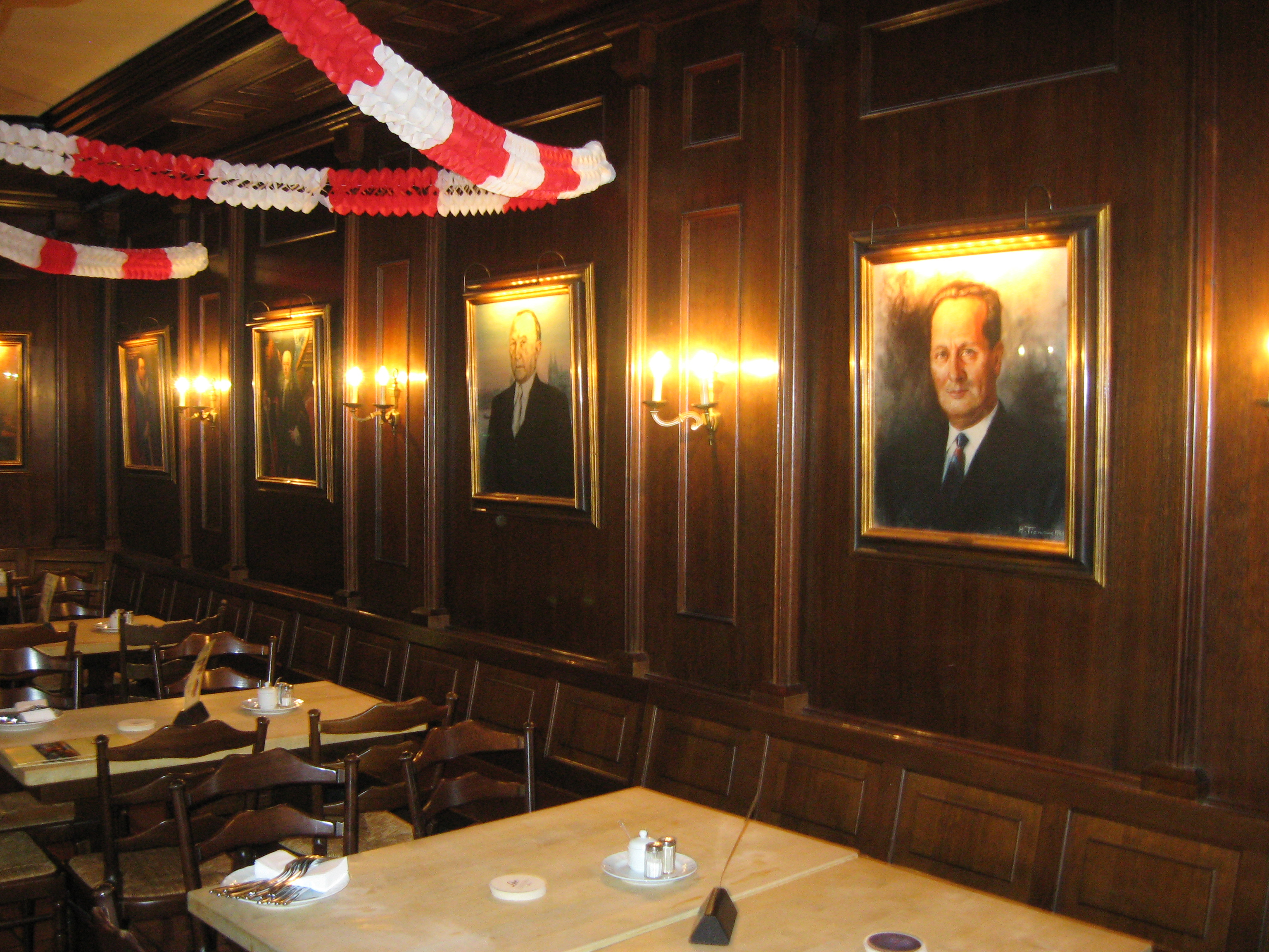 Brauhaus Sion, Ratsherrenstube, Köln (Alter Markt) Datum: 02.03.2011 Urheber M. Pfeiffer alias Benutzer:Gordito1869 Quelle: privates Fotoarchiv des Urhebers